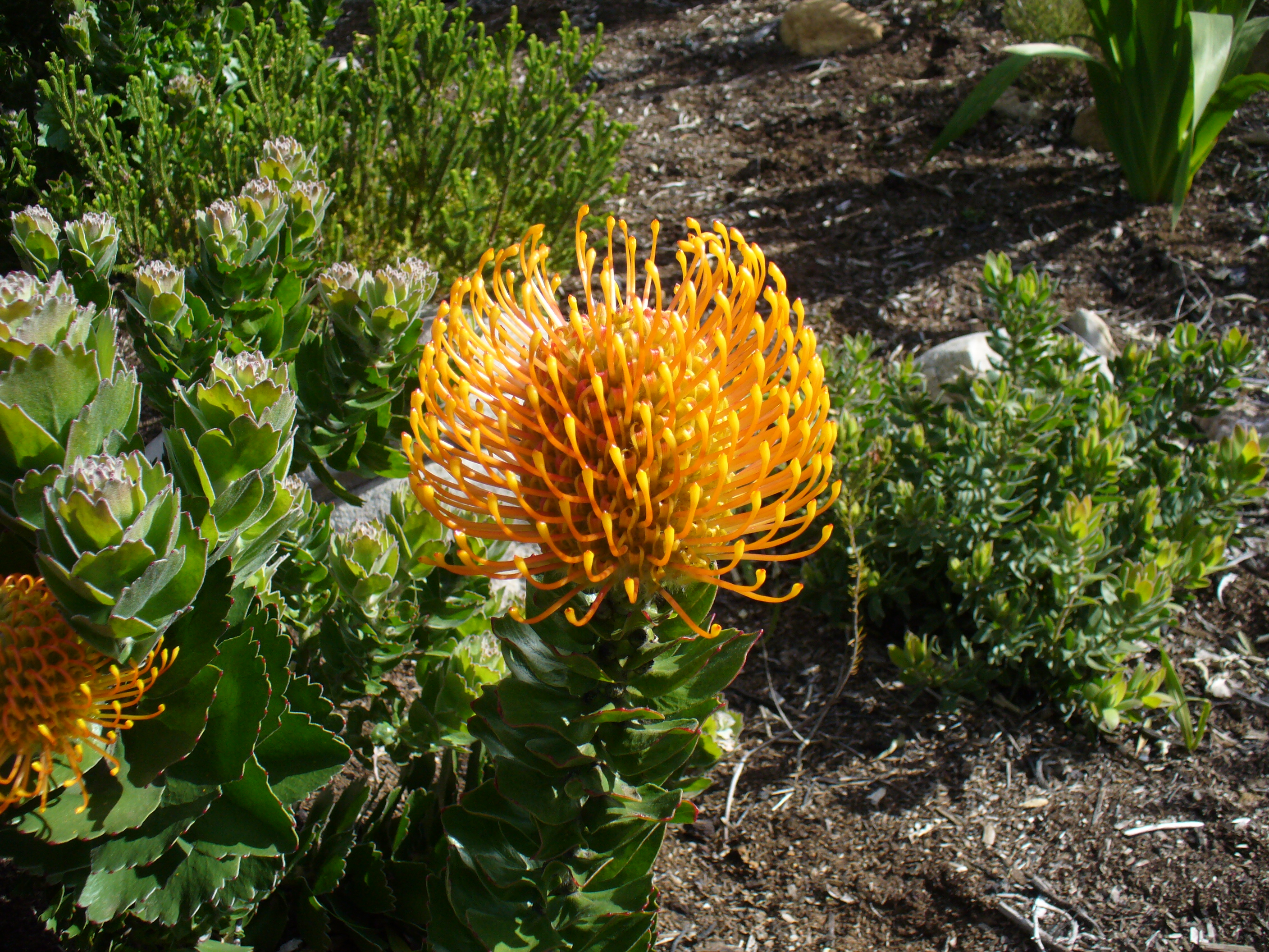 Kirstenbosch Gardens Cape Town